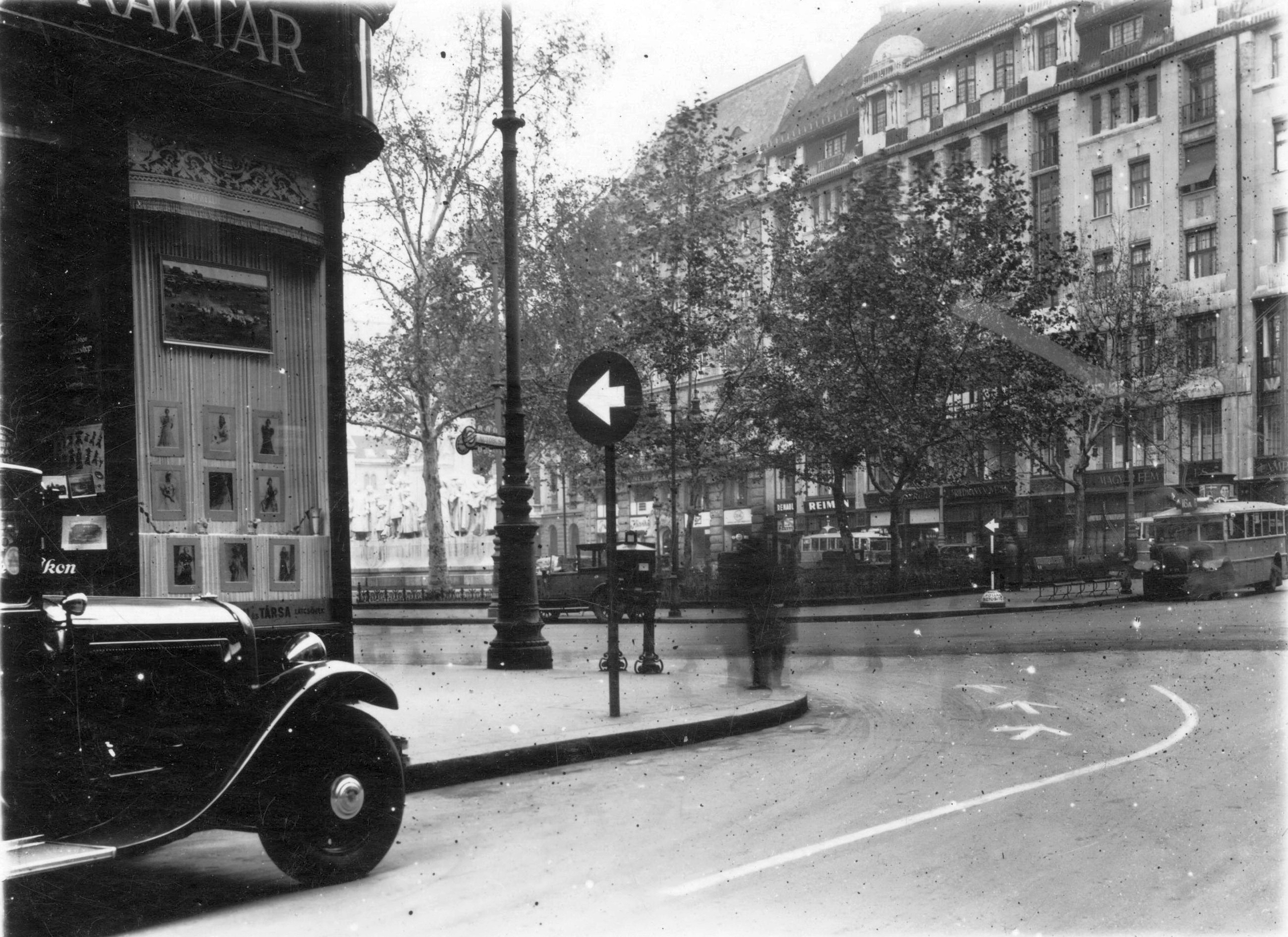 Vörösmarty tér a Deák Ferenc utca felől nézve. Location: Hungary, Budapest V. Tags: street view, automobile, bus, letter box, Budapest Title: Vörösmarty tér a Deák Ferenc utca felől nézve.